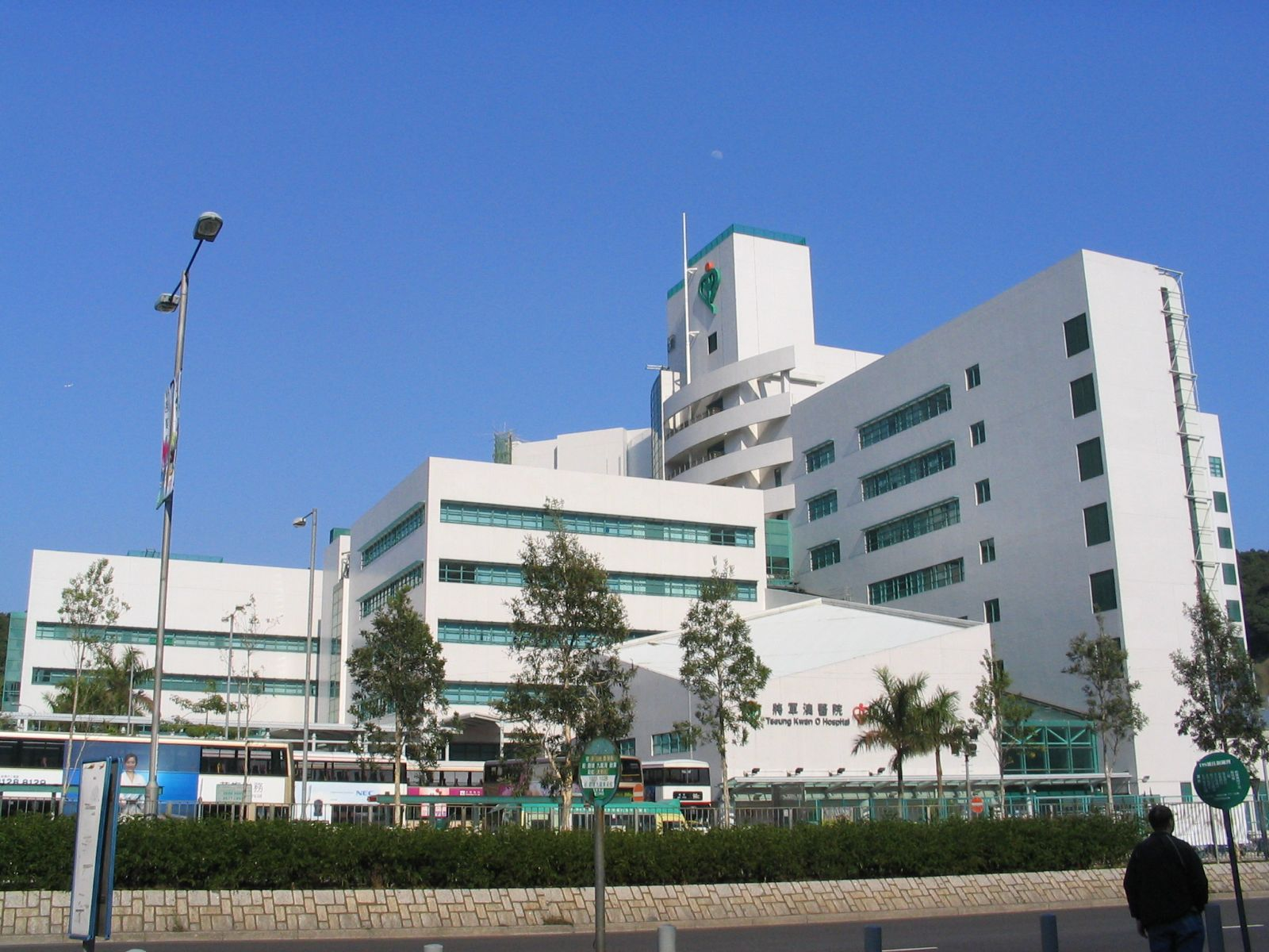 將軍澳醫院 Tseung Kwan O Hospital